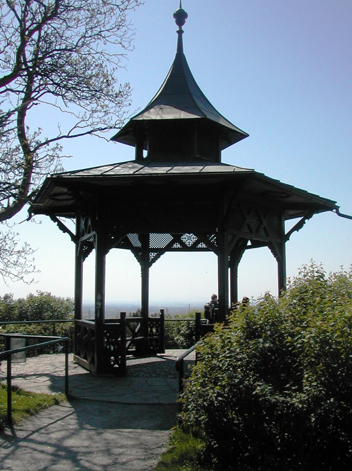 Chinesischer Pavillon